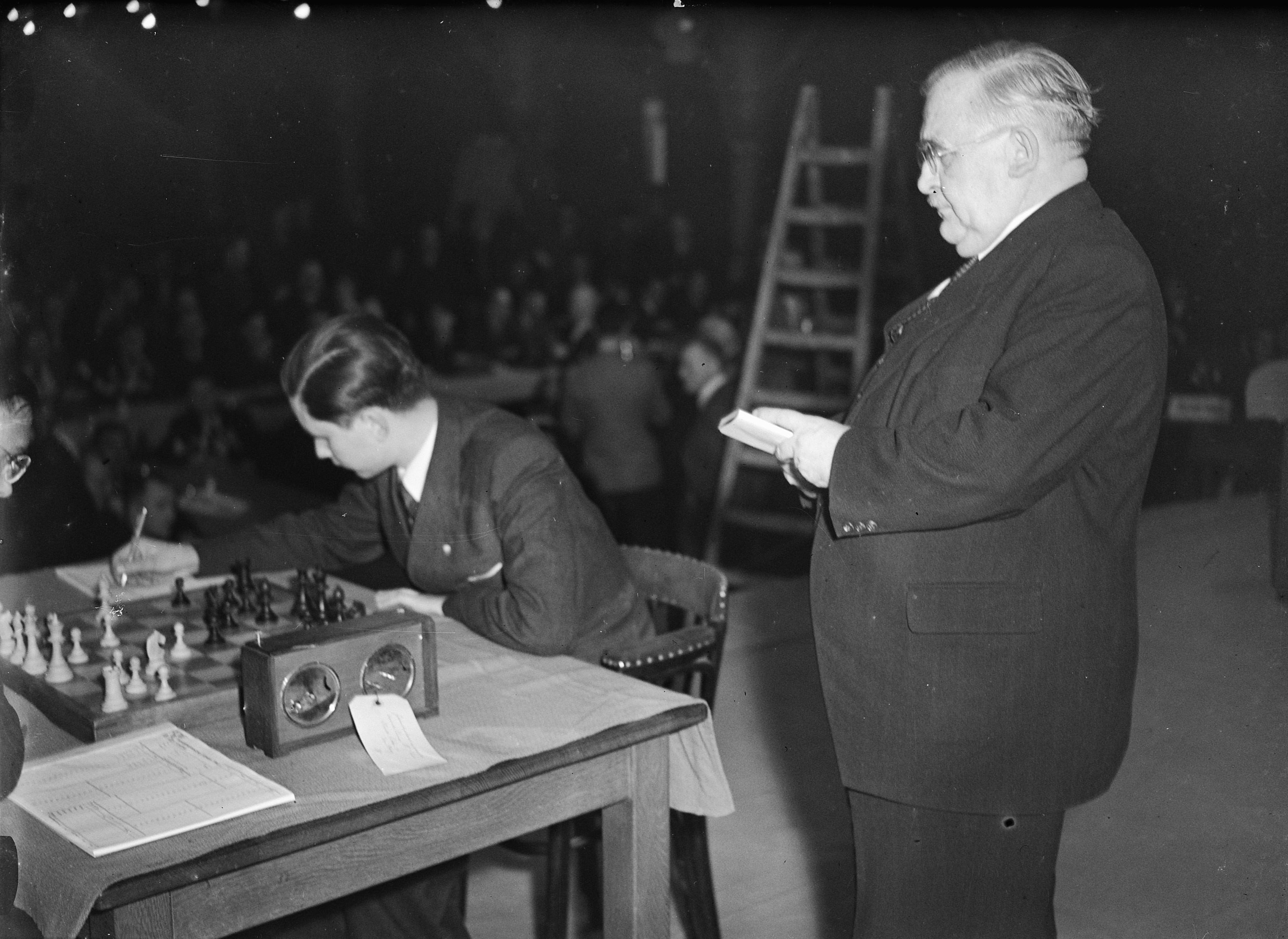 Collectie / Archief : Fotocollectie Anefo Reportage / Serie : [ onbekend ] Beschrijving : Werelkampioenschap Schaken. Keres noteert een zet, onder toeziend oog van wedstrijdleider prof. Vidmar Annotatie : Locatie Grote Zaal Haagse Dierentuin Datum : 26 februari 1948 Locatie : Den Haag Trefwoorden : schaken, sport Persoonsnaam : Keres, P. Fotograaf : Noske, J.D. / Anefo Auteursrechthebbende : Nationaal Archief Materiaalsoort : Glasnegatief Nummer archiefinventaris : bekijk toegang 2.24.01.09 Bestanddeelnummer : 902-6128